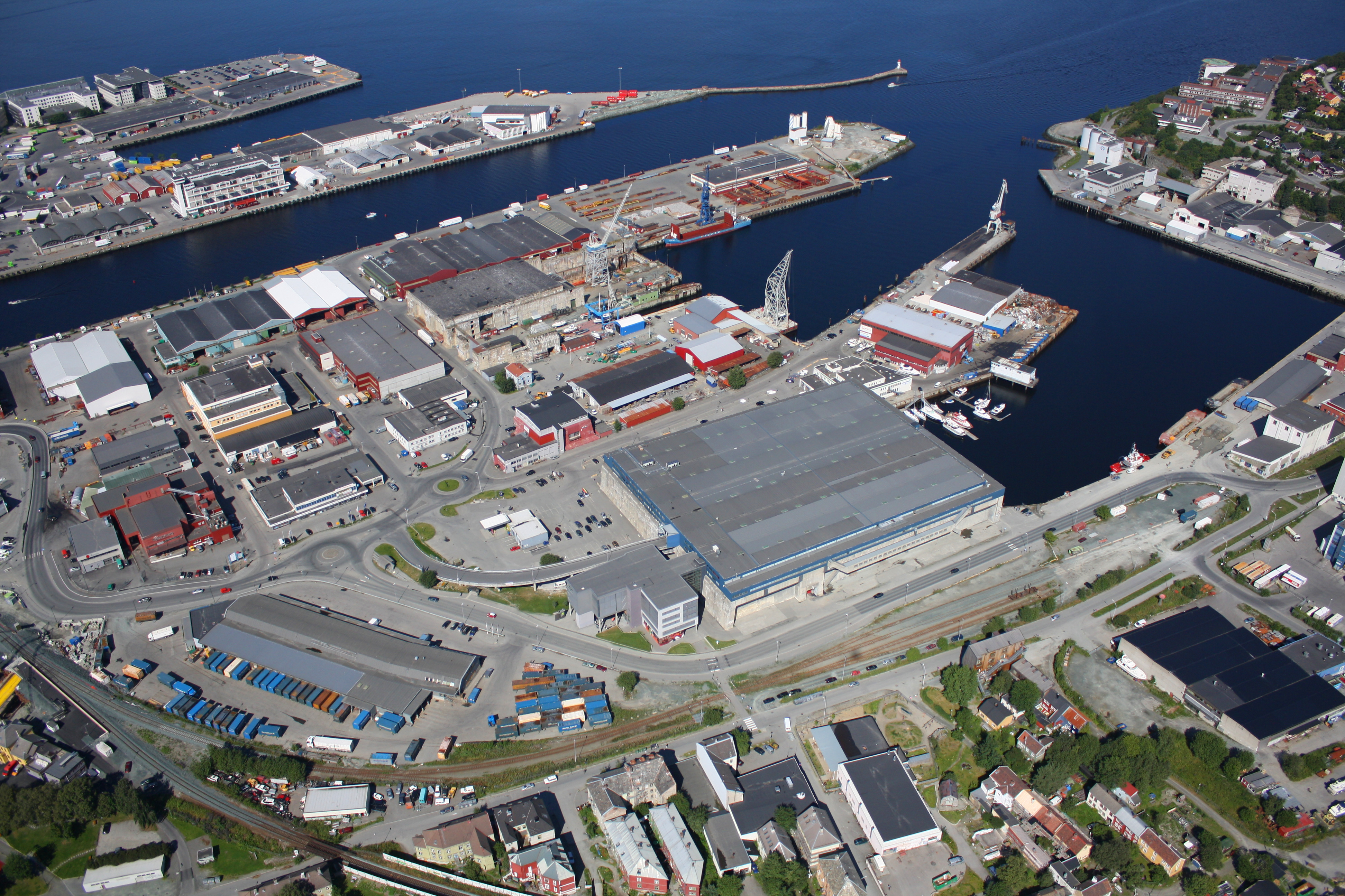 Nyhavna